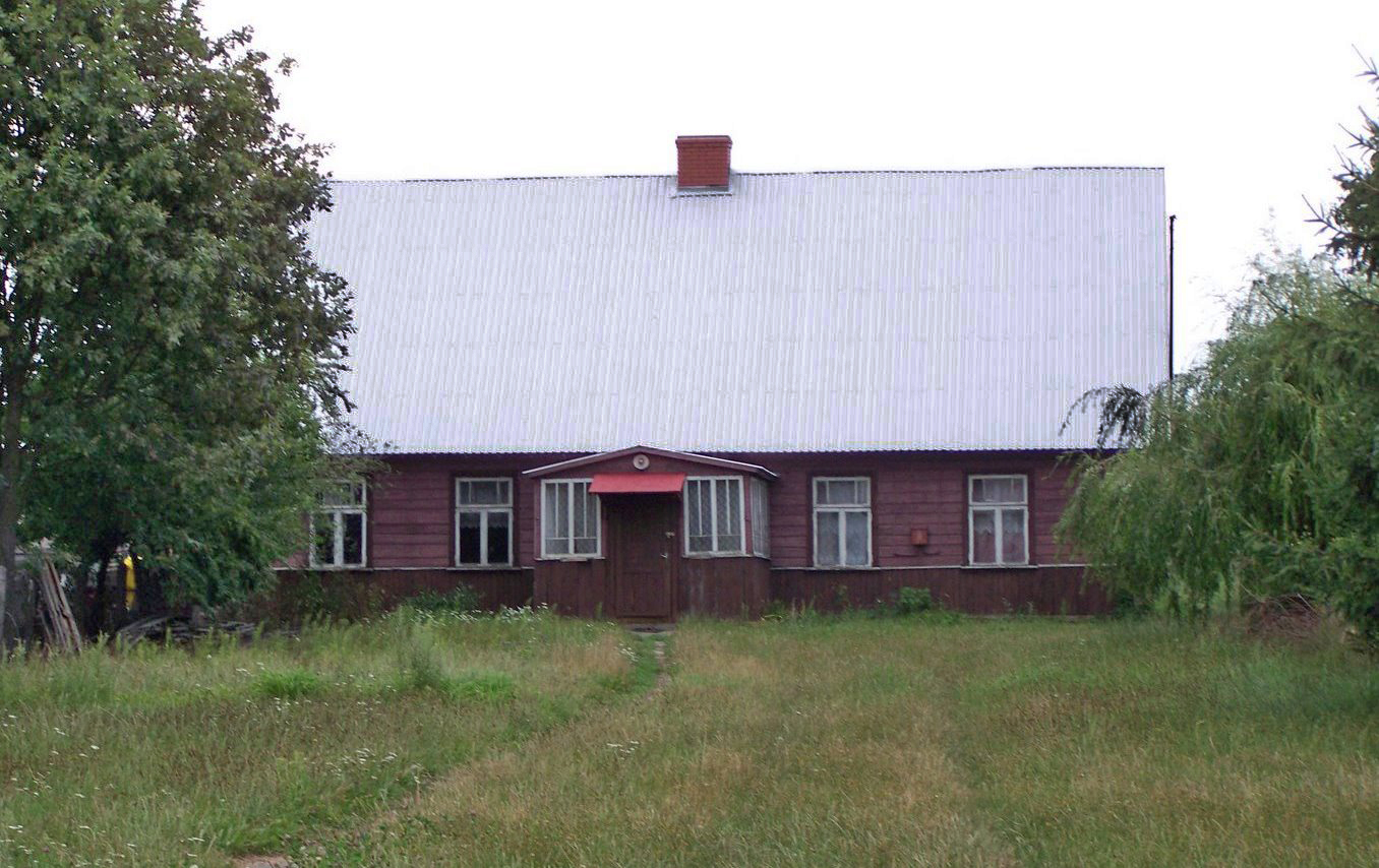 Budynek Szkoły Podstawowej (dawniej Szkoły Powszechnej)